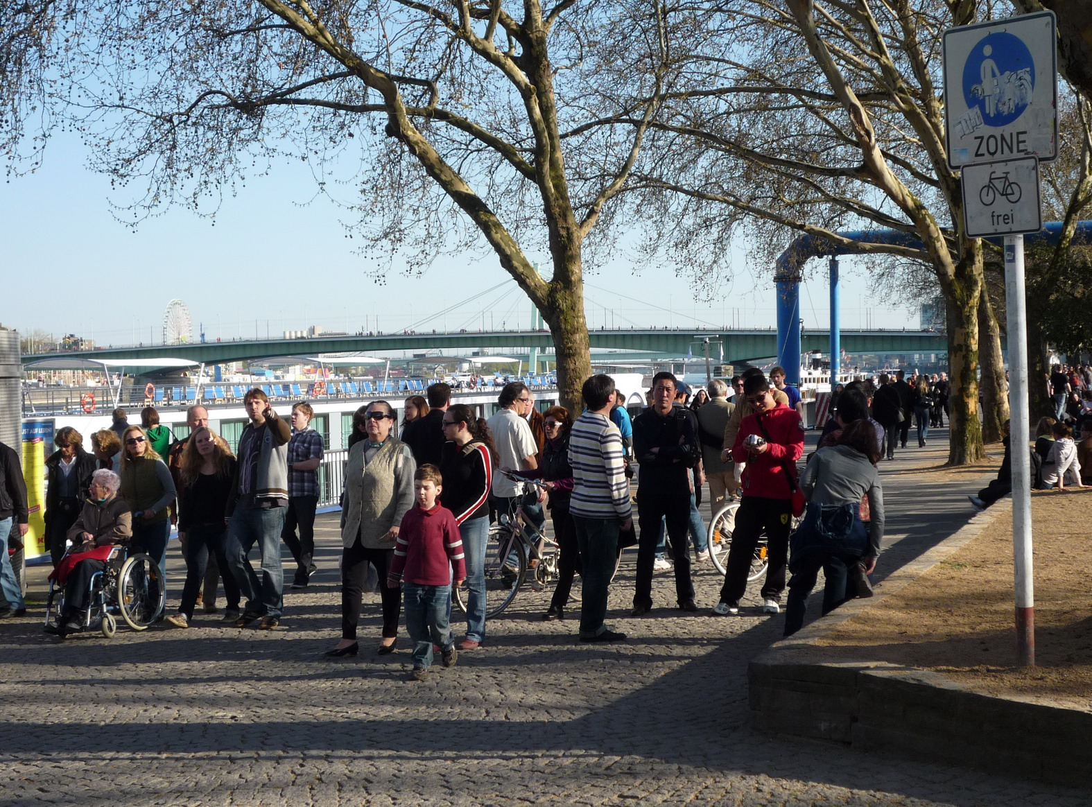 Rheinuferpromenade und Erlebnisweg Rheinschiene beim Kölner Dom (Eisenbahnbrücke) an einem Samstag im April.